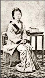 小玉